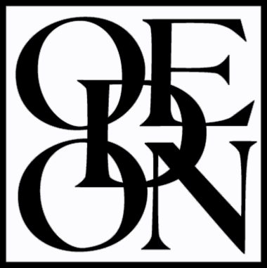 Značka (logo) nakladatelství Odeon